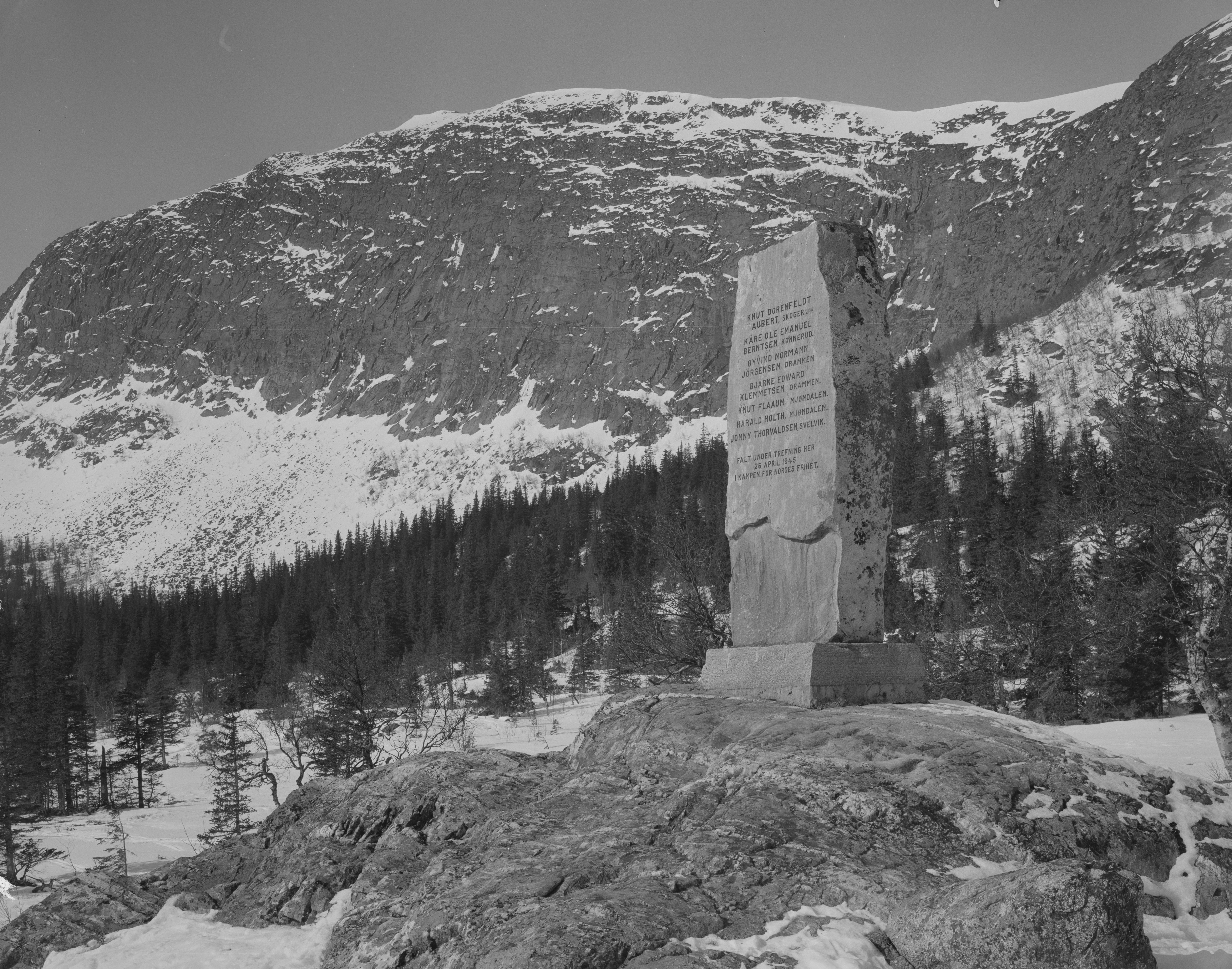 Bildet er hentet fra Nasjonalbibliotekets bildesamling Haglebu, Sigdal, Buskerud Depicted person: Husmo, Arnulf